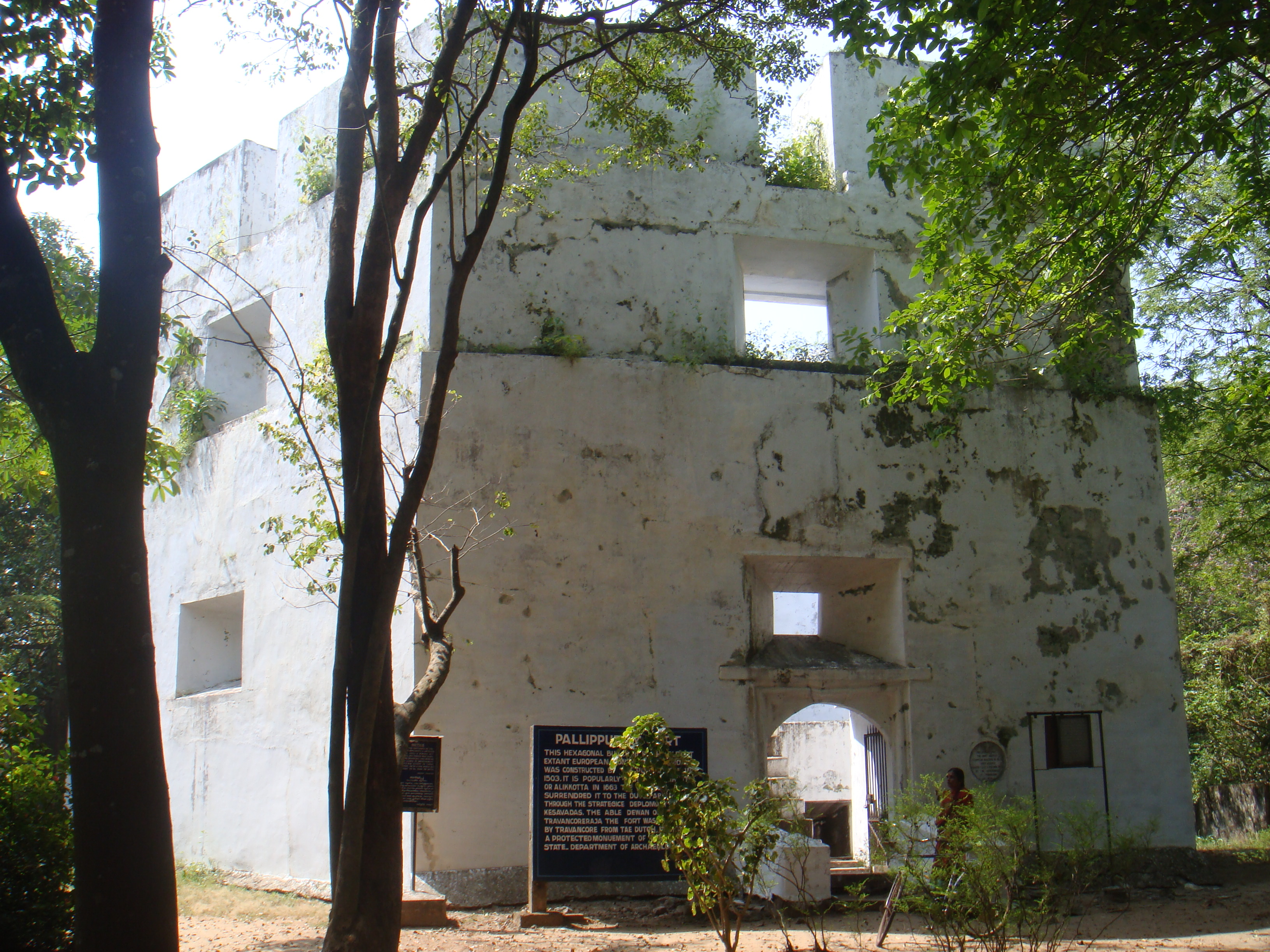 എറണാകുളം ജില്ലയിലെ വൈപ്പിൻ കരയിൽ പള്ളിപ്പുറം എന്ന സ്ഥലത്ത് നിലകൊള്ളുന്ന ആയക്കോട്ട, അഥവാ പള്ളിപ്പുറം കോട്ട.